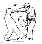 cobra1.jpg